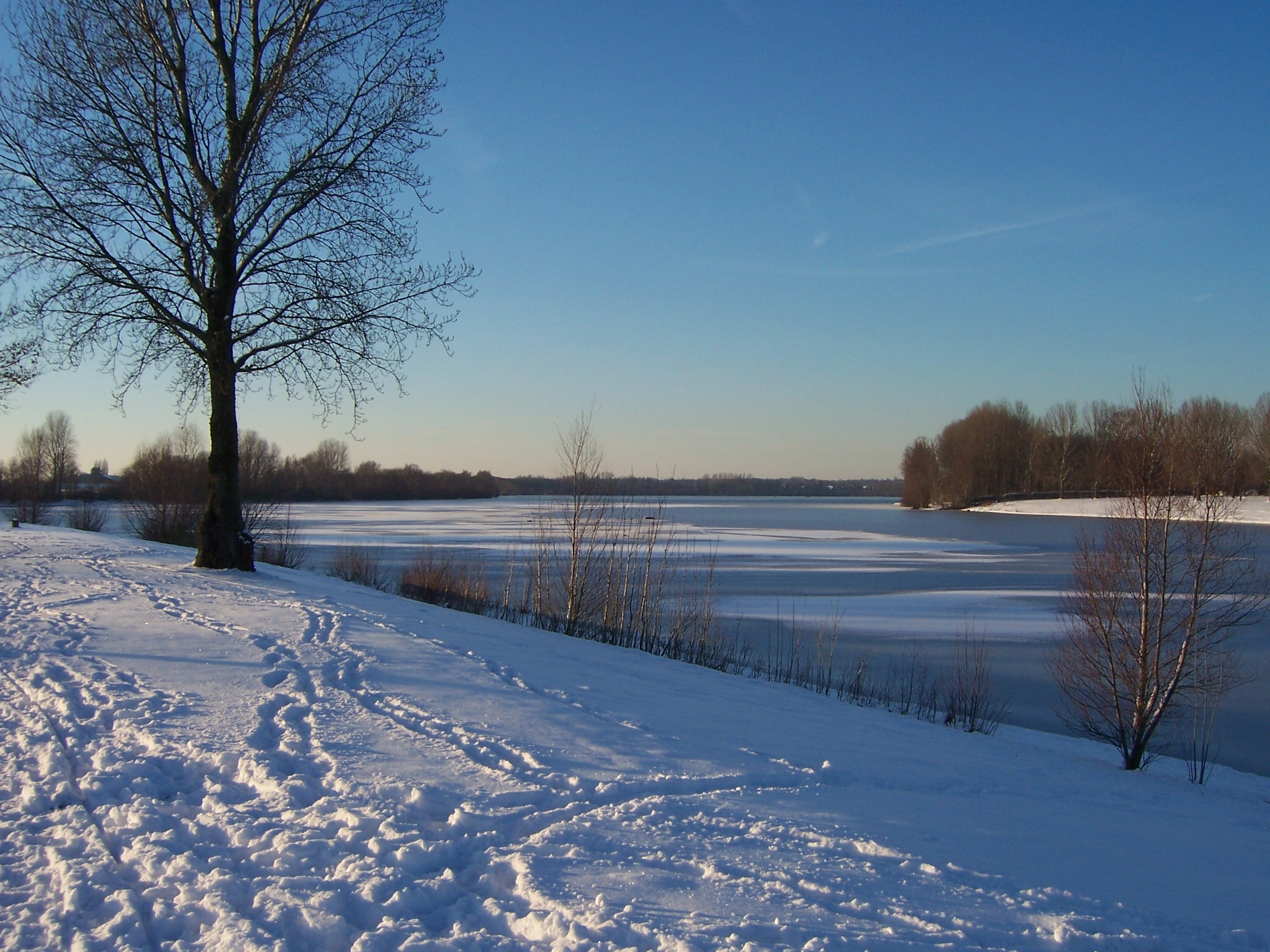 Ufer des Auesee im Winter (Januar 2009)